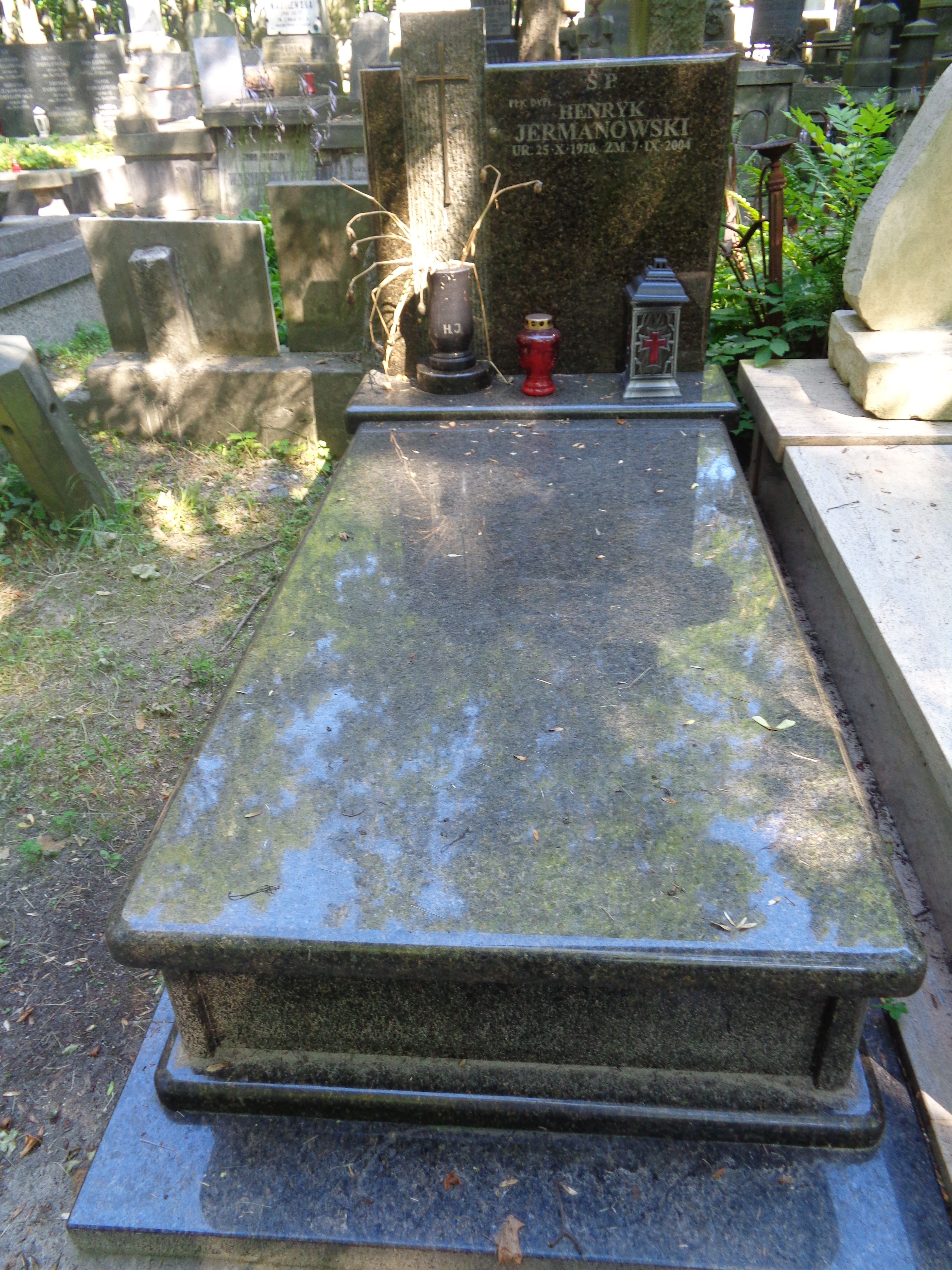 Grób Henryka Jermanowskiego na Cmentarzu Powązkowskim